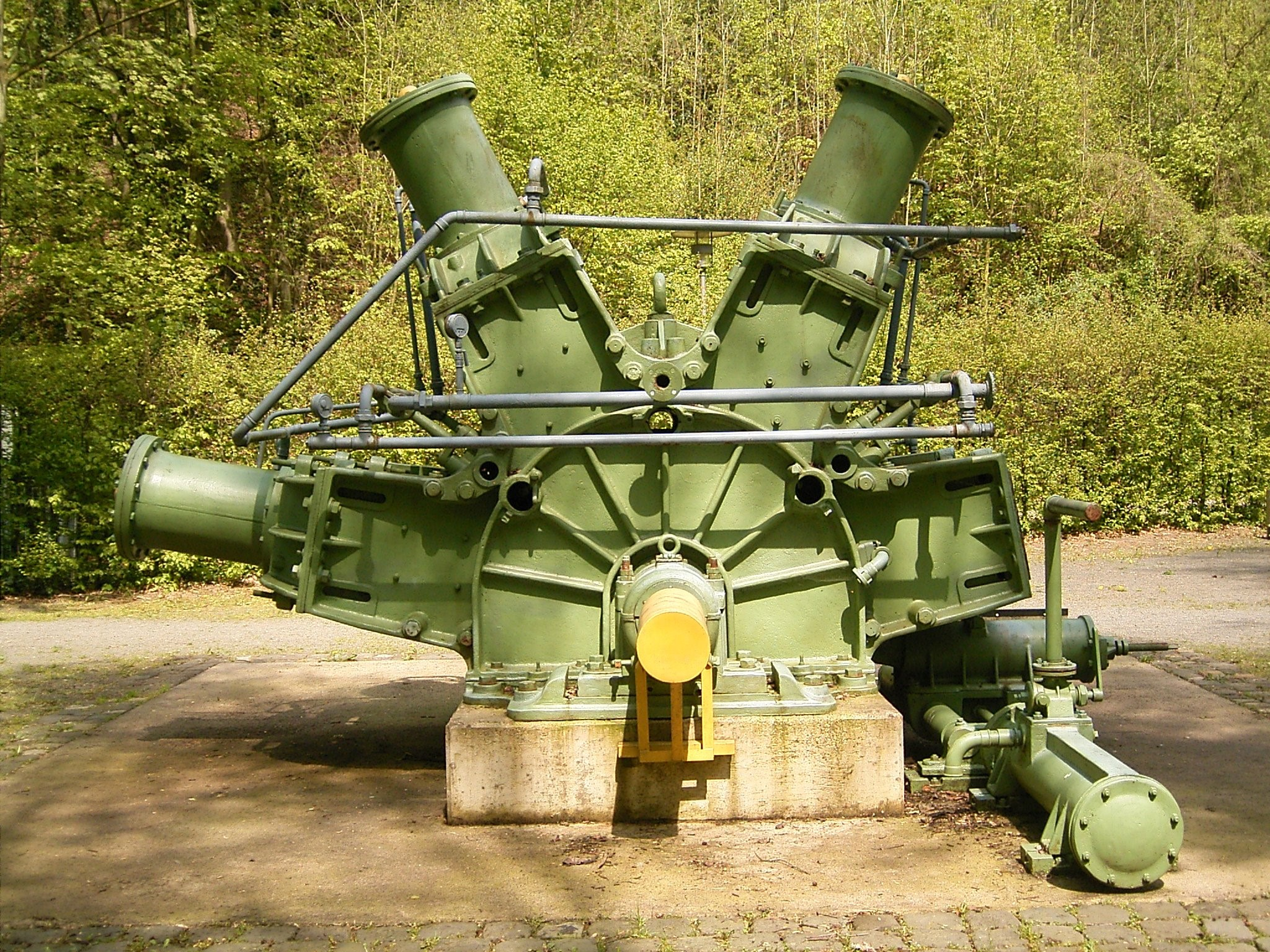 Holzschleifmaschine der Papiermühle Alte Dombach in Bergisch Gladbach